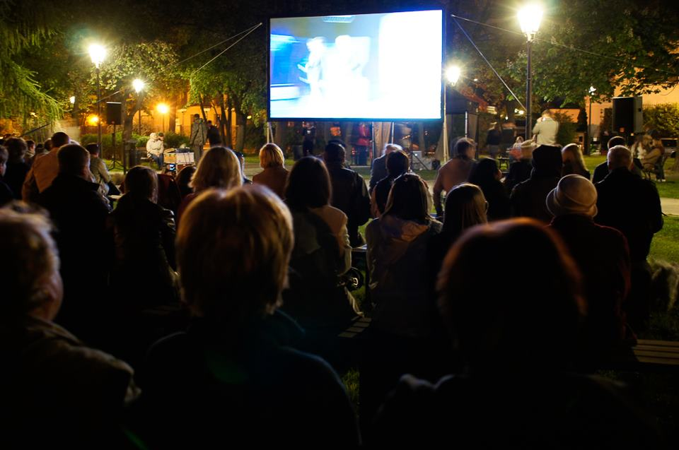 Festiwal Otwarte Ogrody Sadyba 2012: kino plenerowe